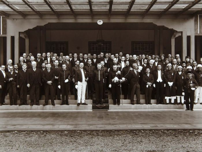 Foto. Groepsportret tijdens een officiële gebeurtenis, Bandjermasin